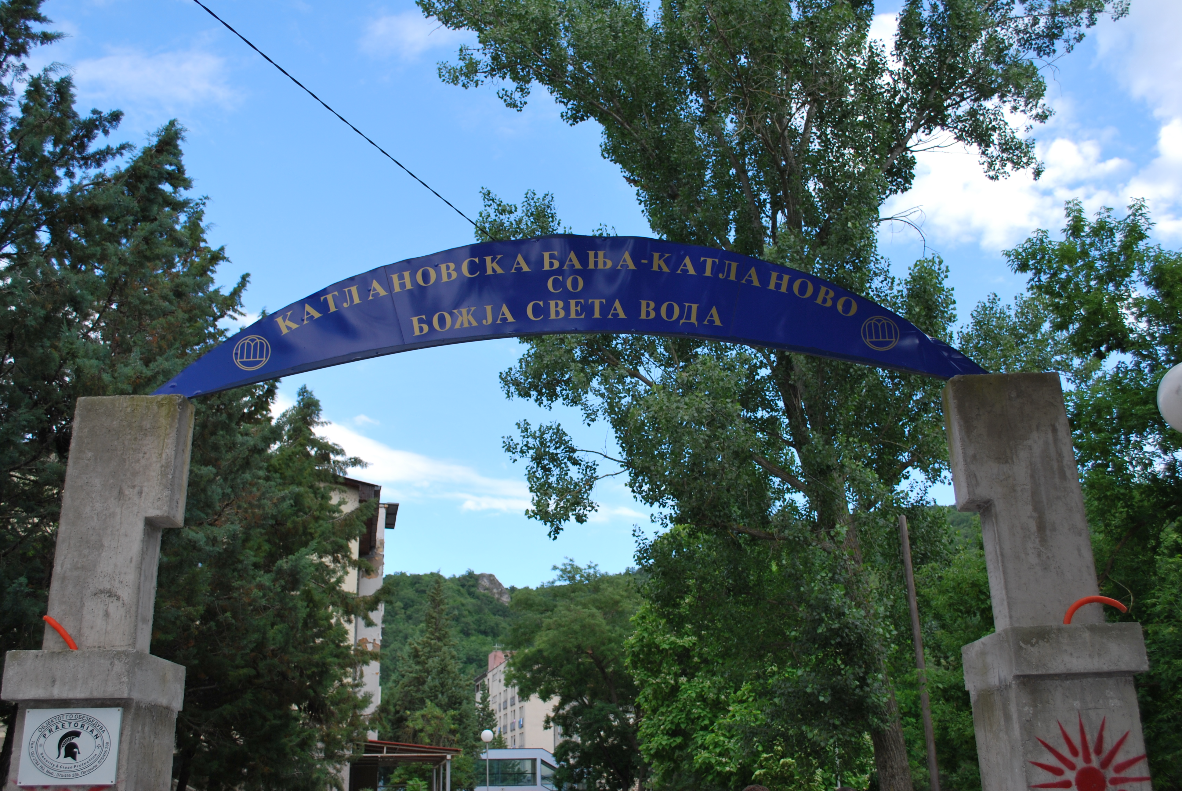 Катлановска Бања - Скопје